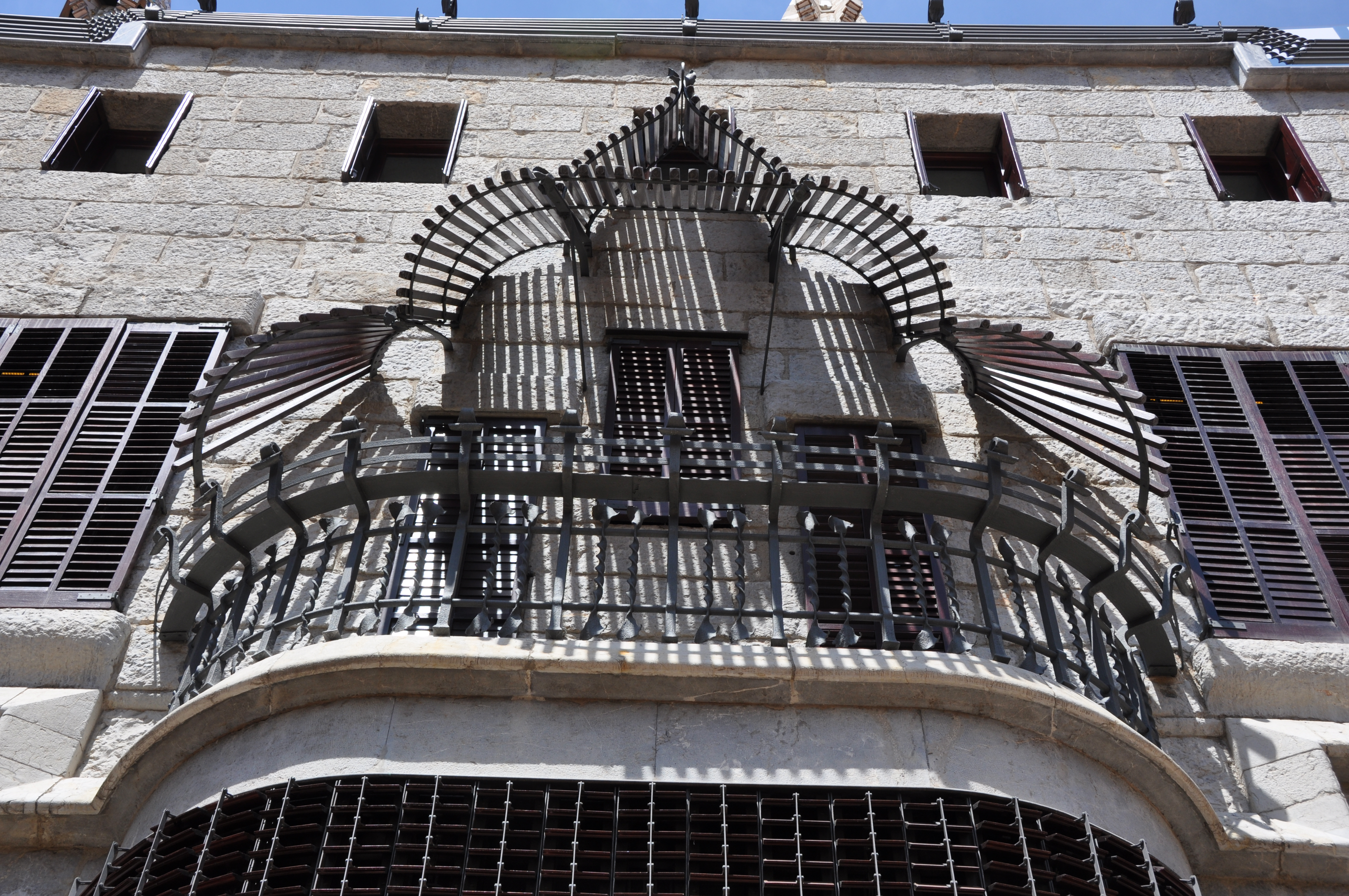 Detall de la façana posterior del Palau Güell, obra d’Antoni Gaudí, 1885-1890, Barcelona